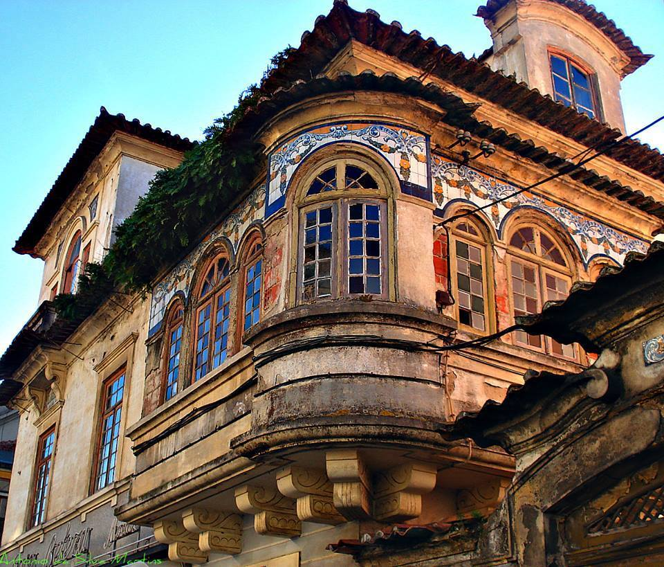 Aveiro (Portugal) Vivenda situada na Avenida Lourenço Peixinho, Aveiro